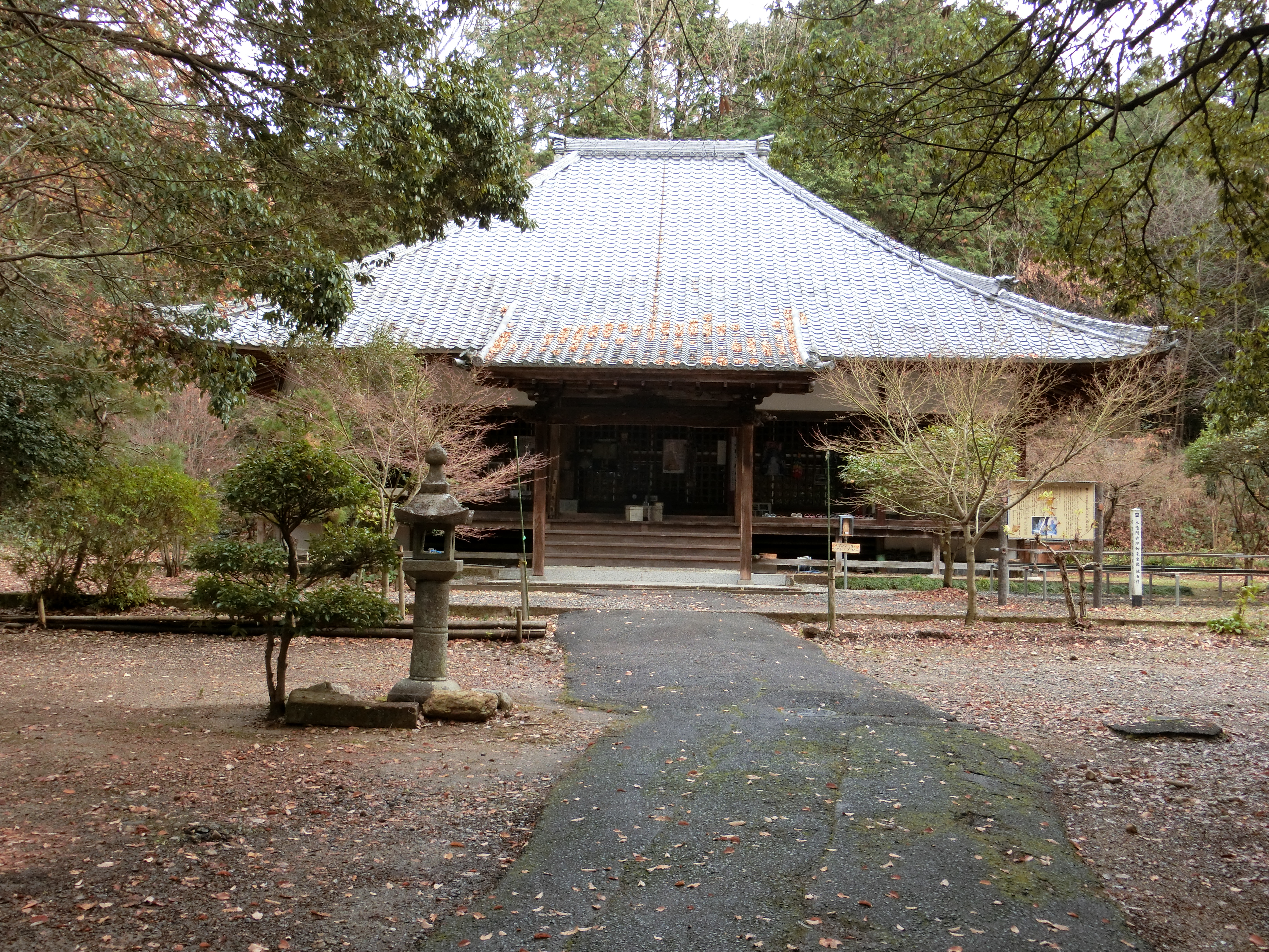 可児市の寺院、薬王寺。